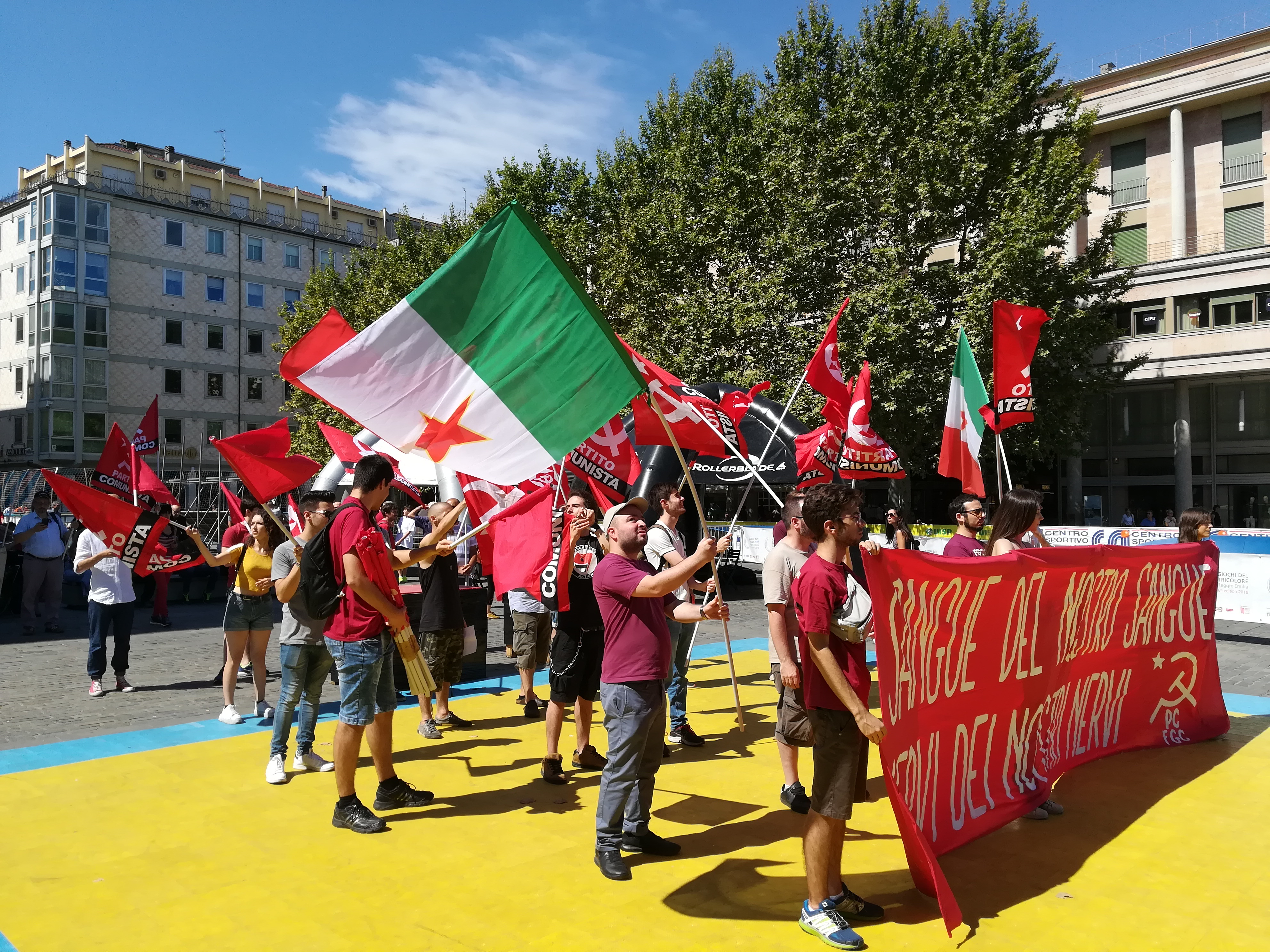 Presidio in ricordo dei Morti di Reggio Emilia - 7 luglio 2018. Tra i partecipanti: PC (Partito Comunista) e FGC (Fronte della Gioventù Comunista).